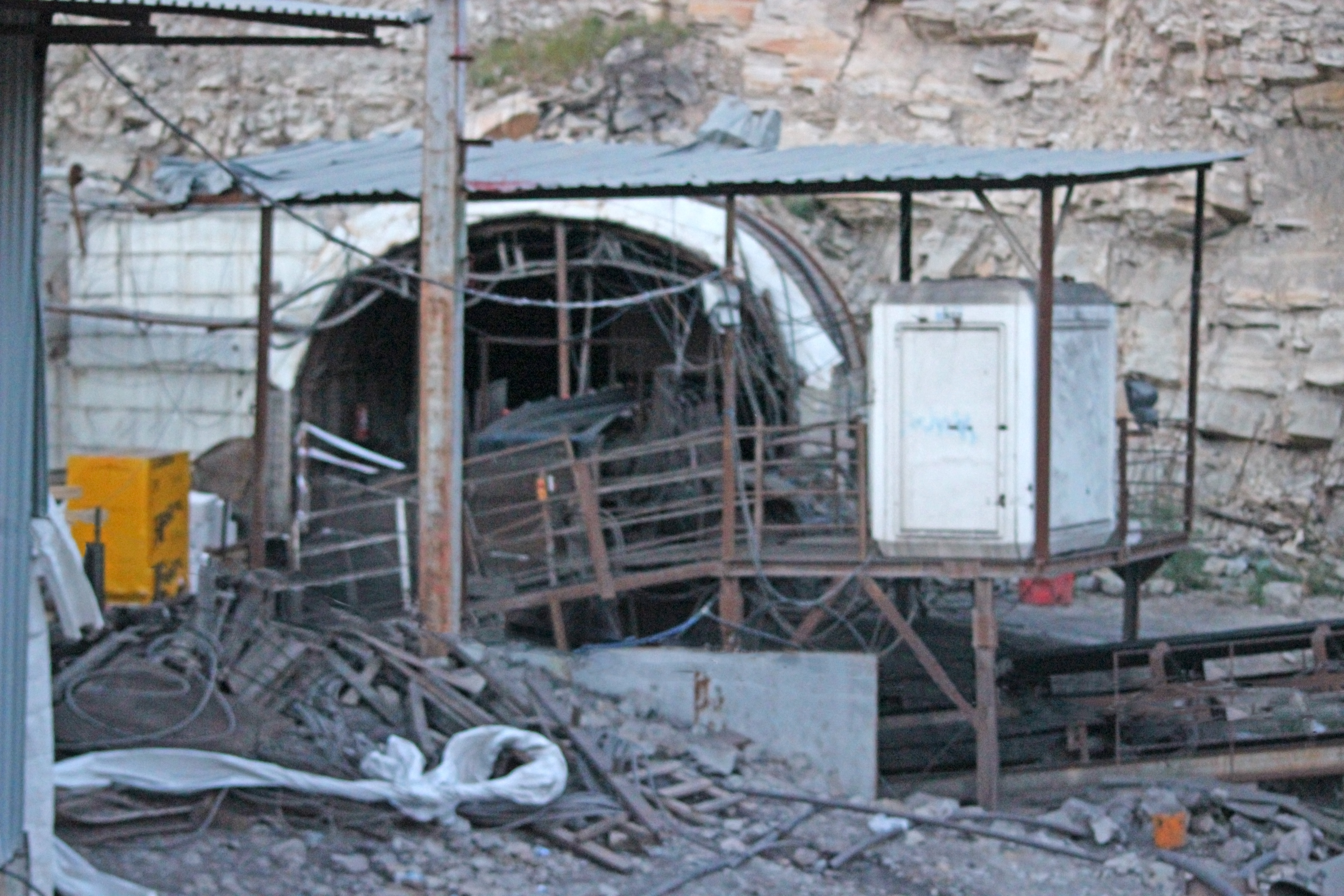 Mundloch Braunkohlenbergwerk Soma, Westanatolien, Türkei.